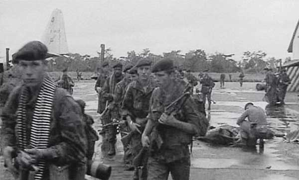 Operation 'Dragon Rouge': Para-Commandos auf dem Flugfeld von Stanleyville